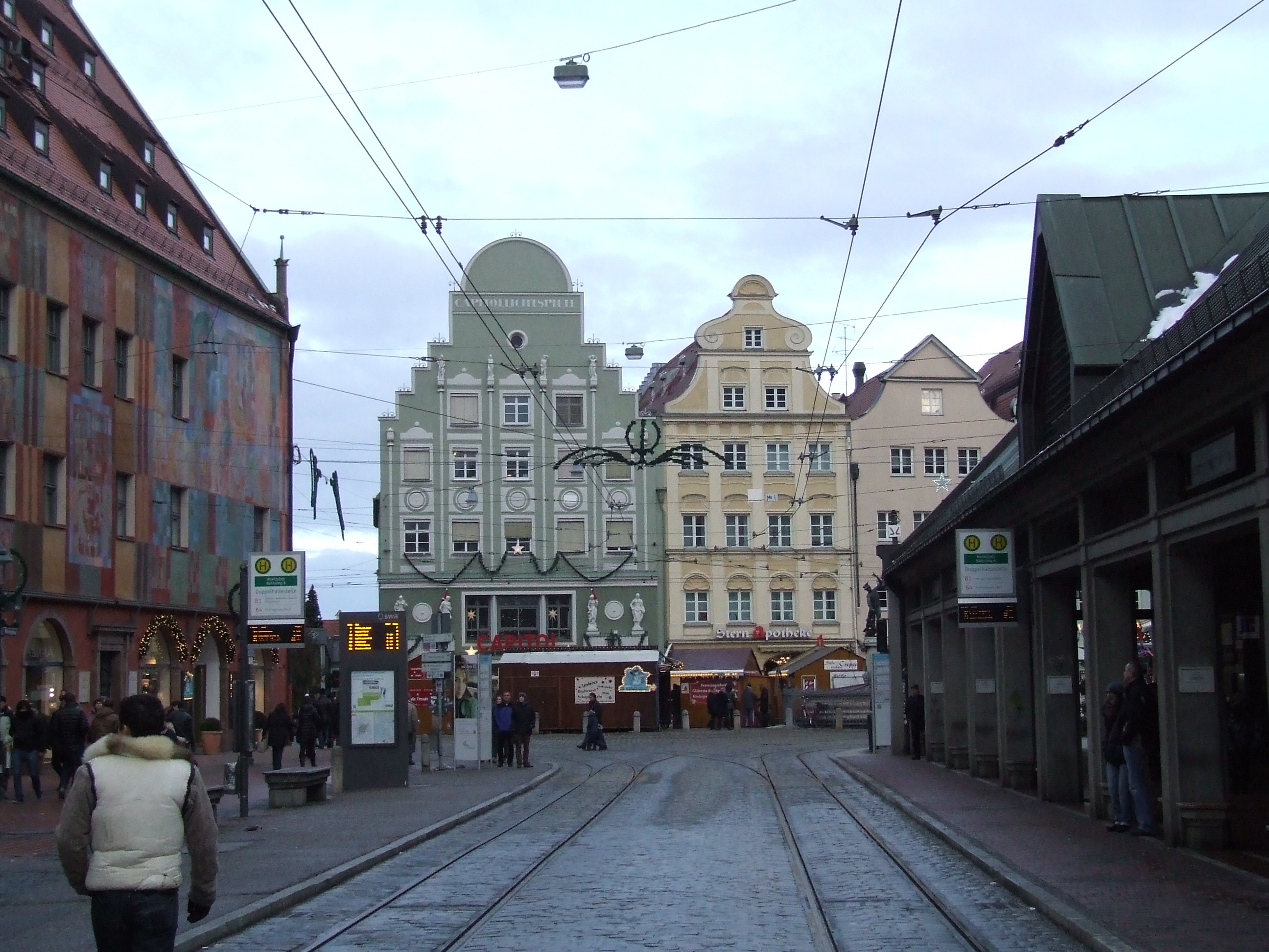 Moritzplatz, Capitol (ehem. Lichtspielhaus) und Stern-Apotheke in Augsburg